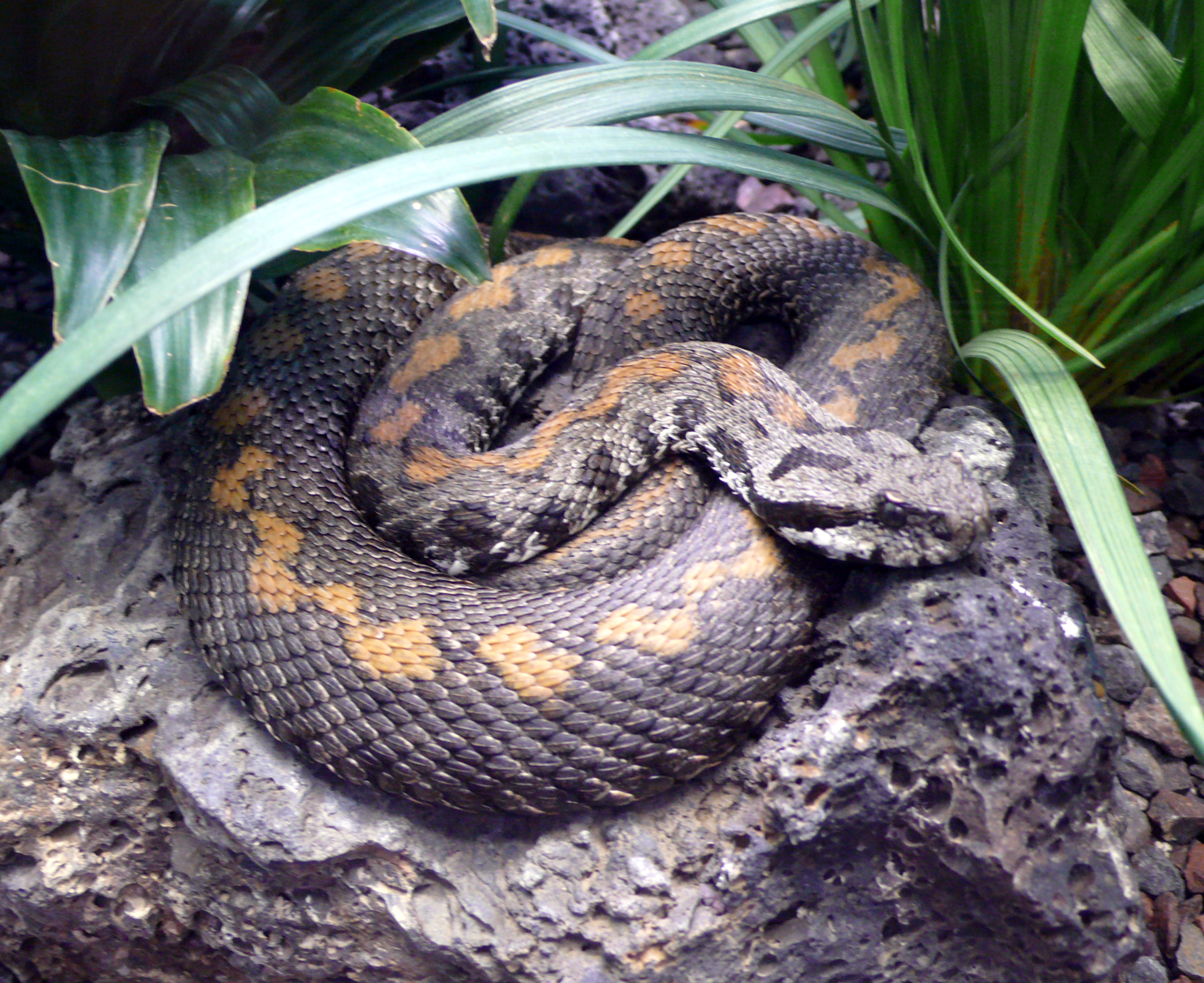 Armenian viper (Vipera raddei)